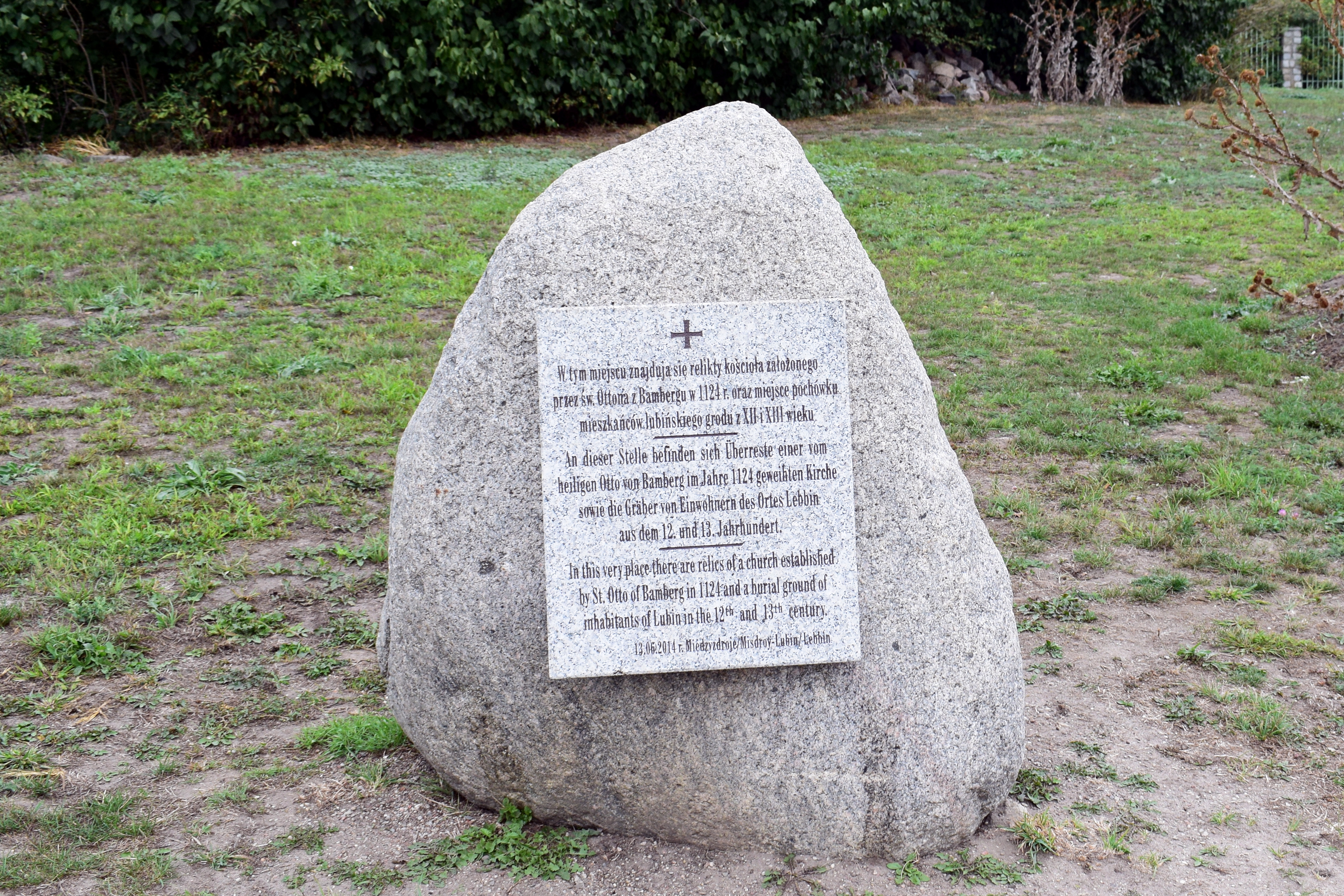 Gedenkstein für die 1124 erbaute Kirche im Burgwall von Lubin (Lebbin), Insel Wolin, Polen.